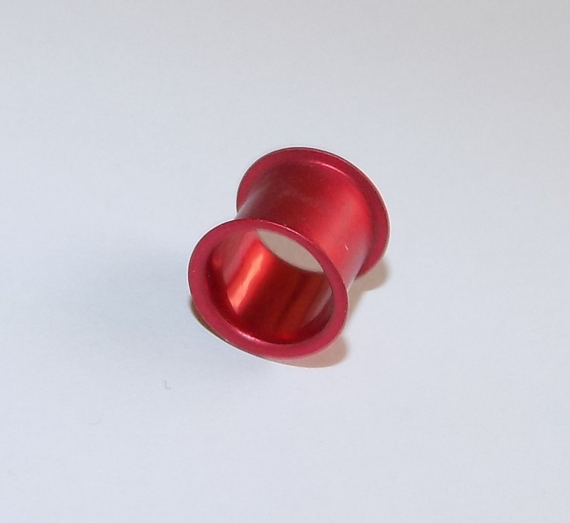 Neozedpasseinsatz 10A